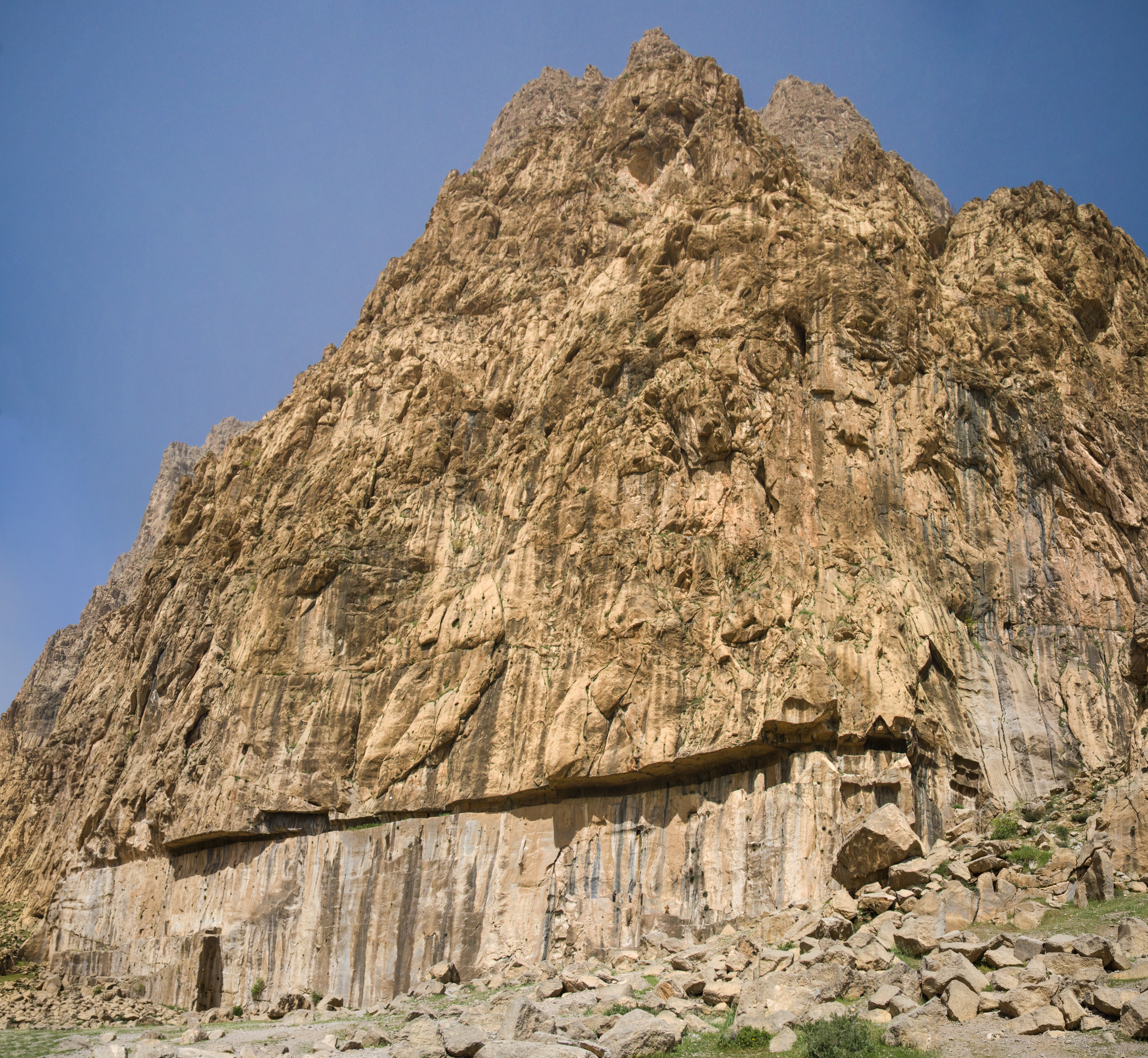 .پانورامای کوه فرهادتراش بیستون کرمانشاهکوردی: وێنەی کێوی فەرادتاش لە بێستوونی کرماشان